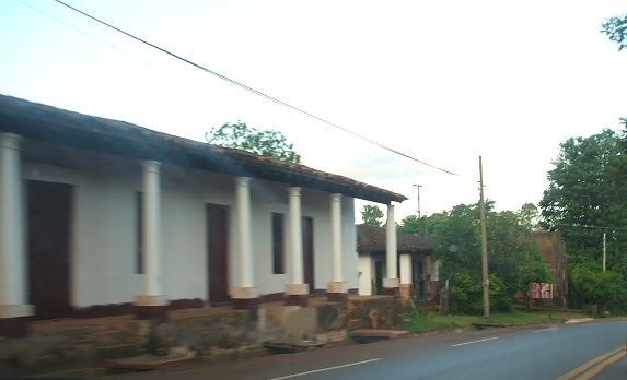 Casona en Itacurubí